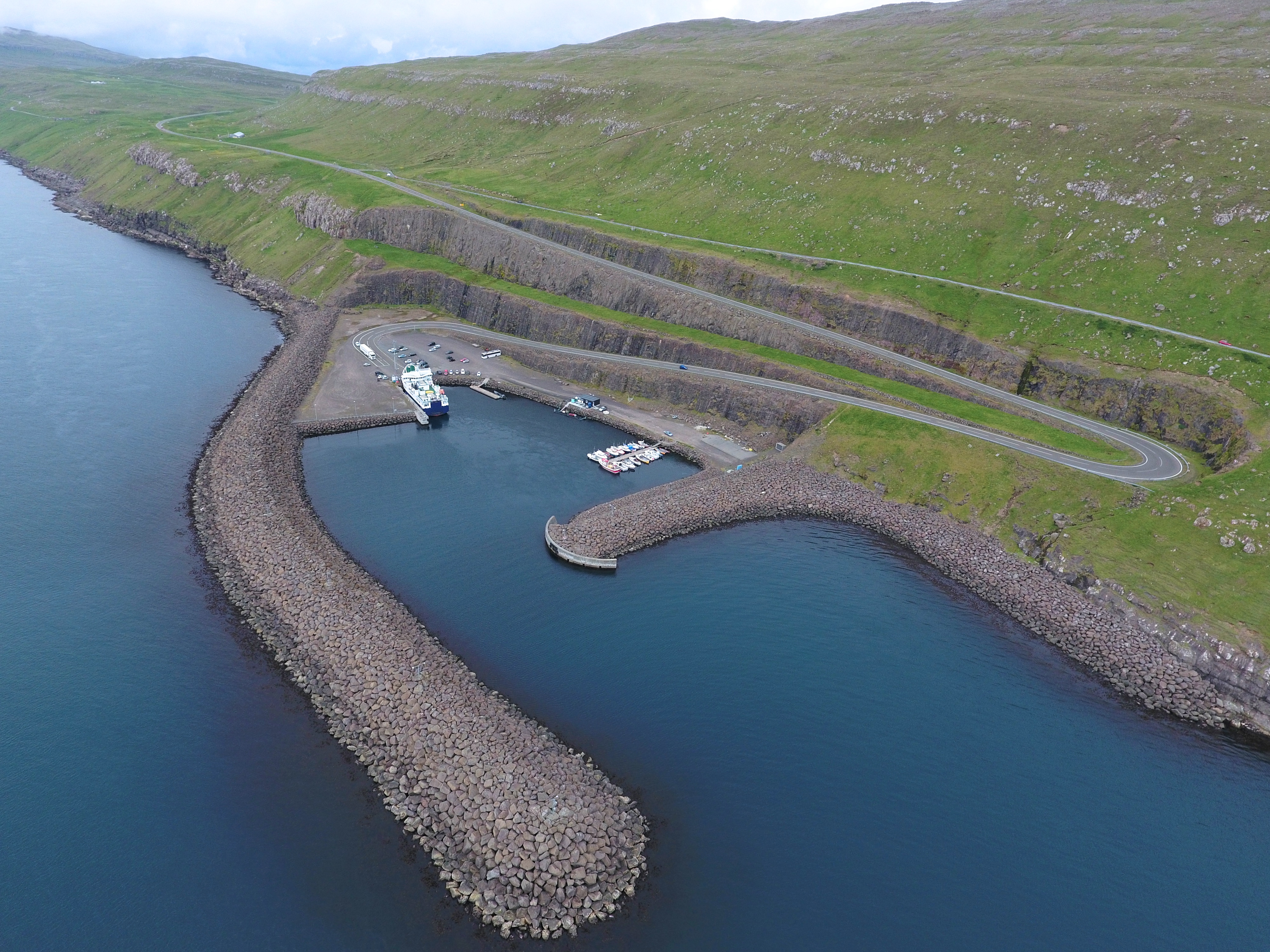 Luftfoto af Gamlarætt